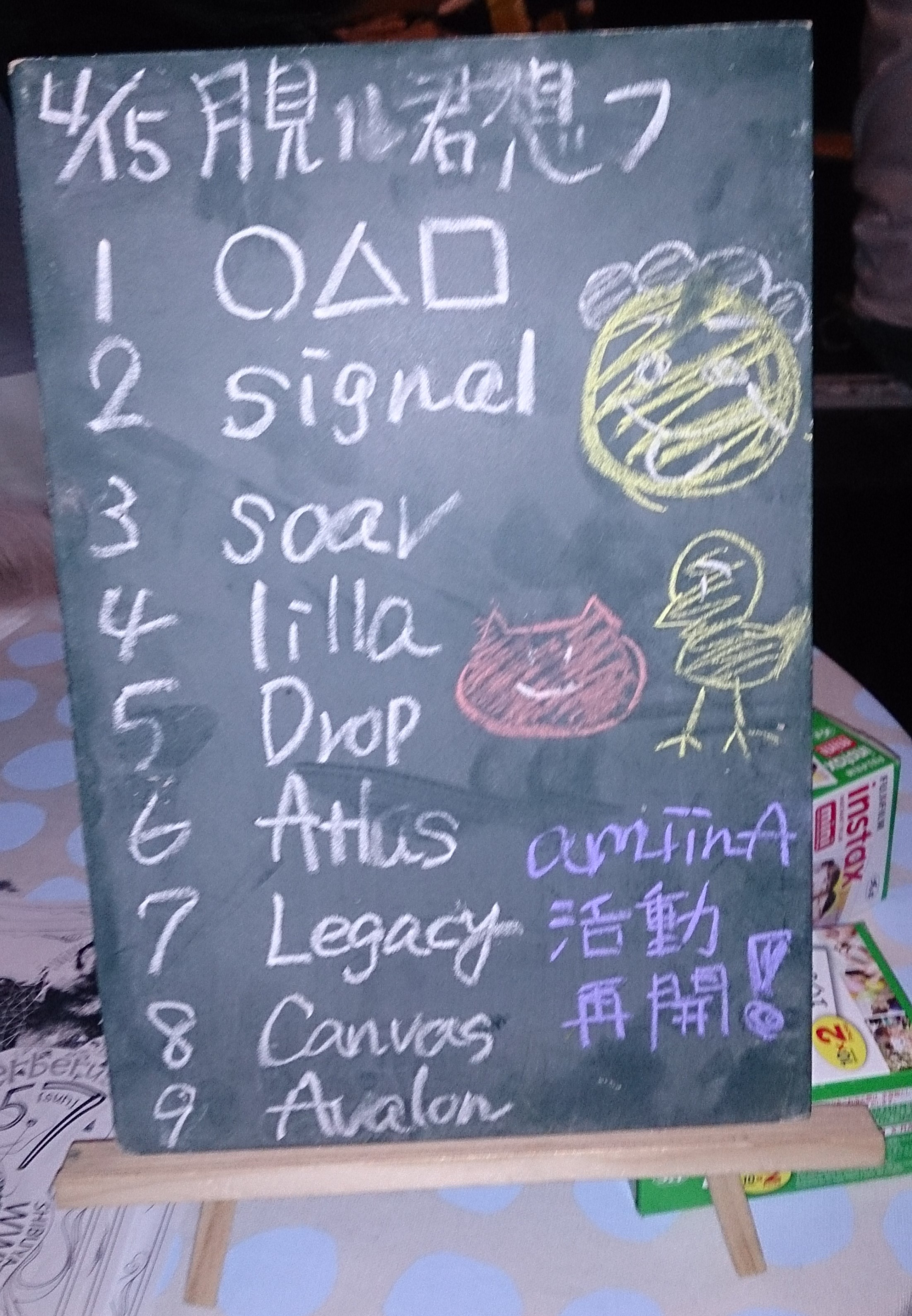 amiinAセトリボード(20170415(1))